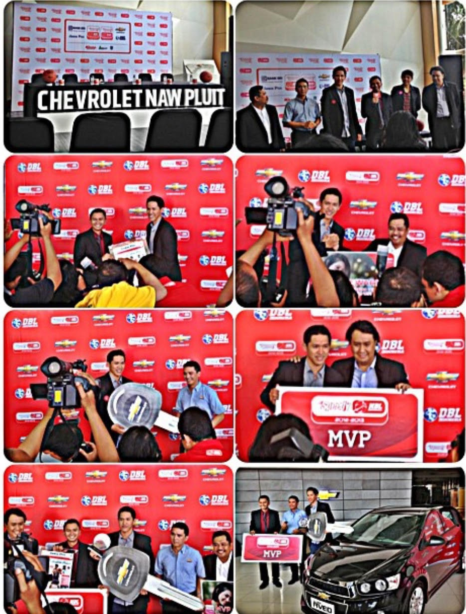 Pringgo ketika meraih penghargaan pemain terbaik 2013